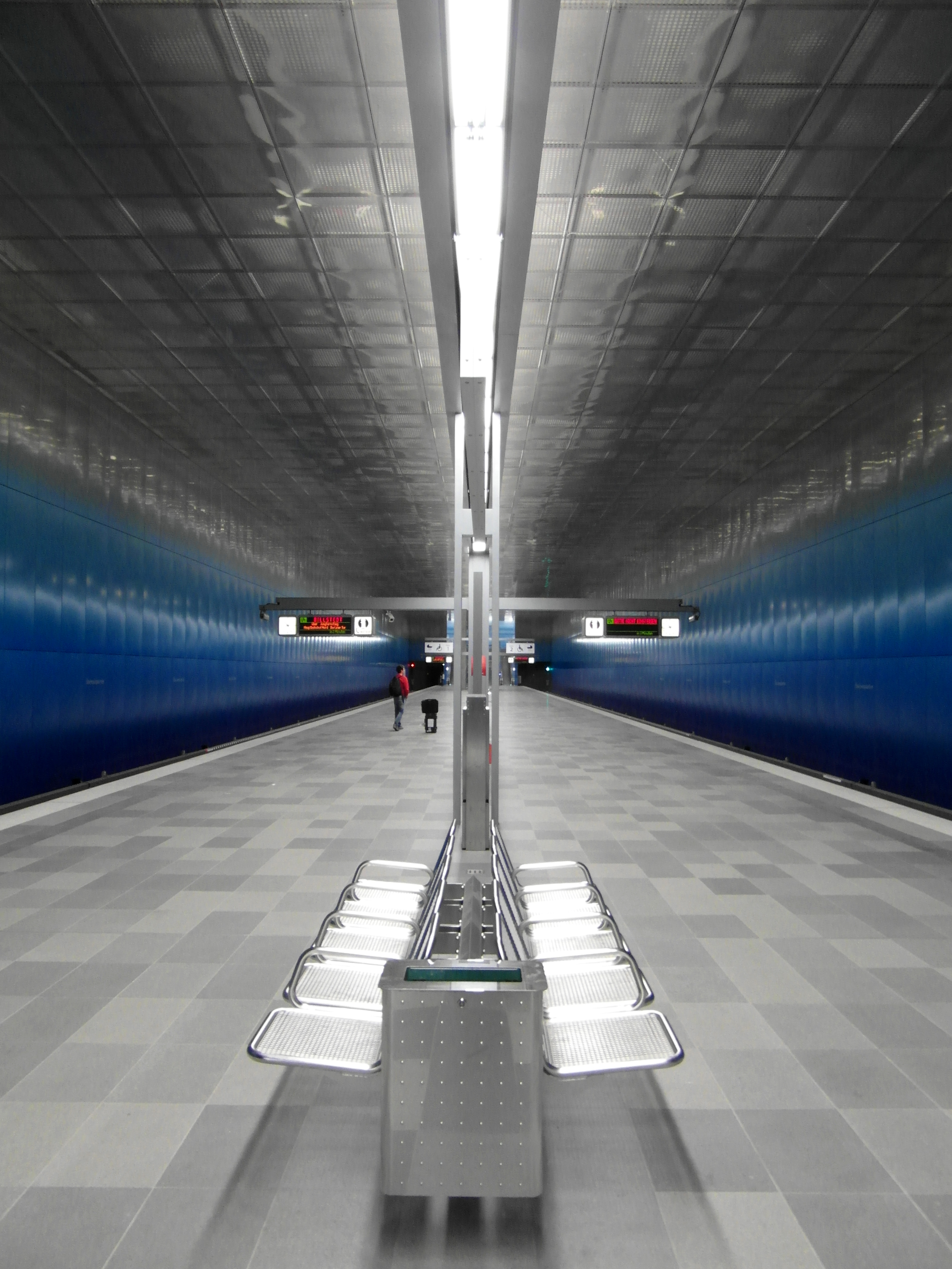 U-Bahnhof Überseequartier in Hamburg